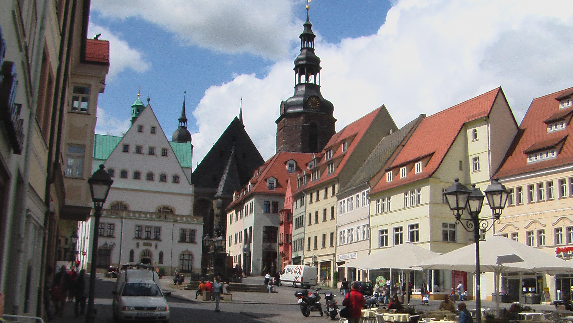 Der Marktplatz der Lutherstadt Eisleben, in seiner Mitte steht ein Standbild von Martin Luther.